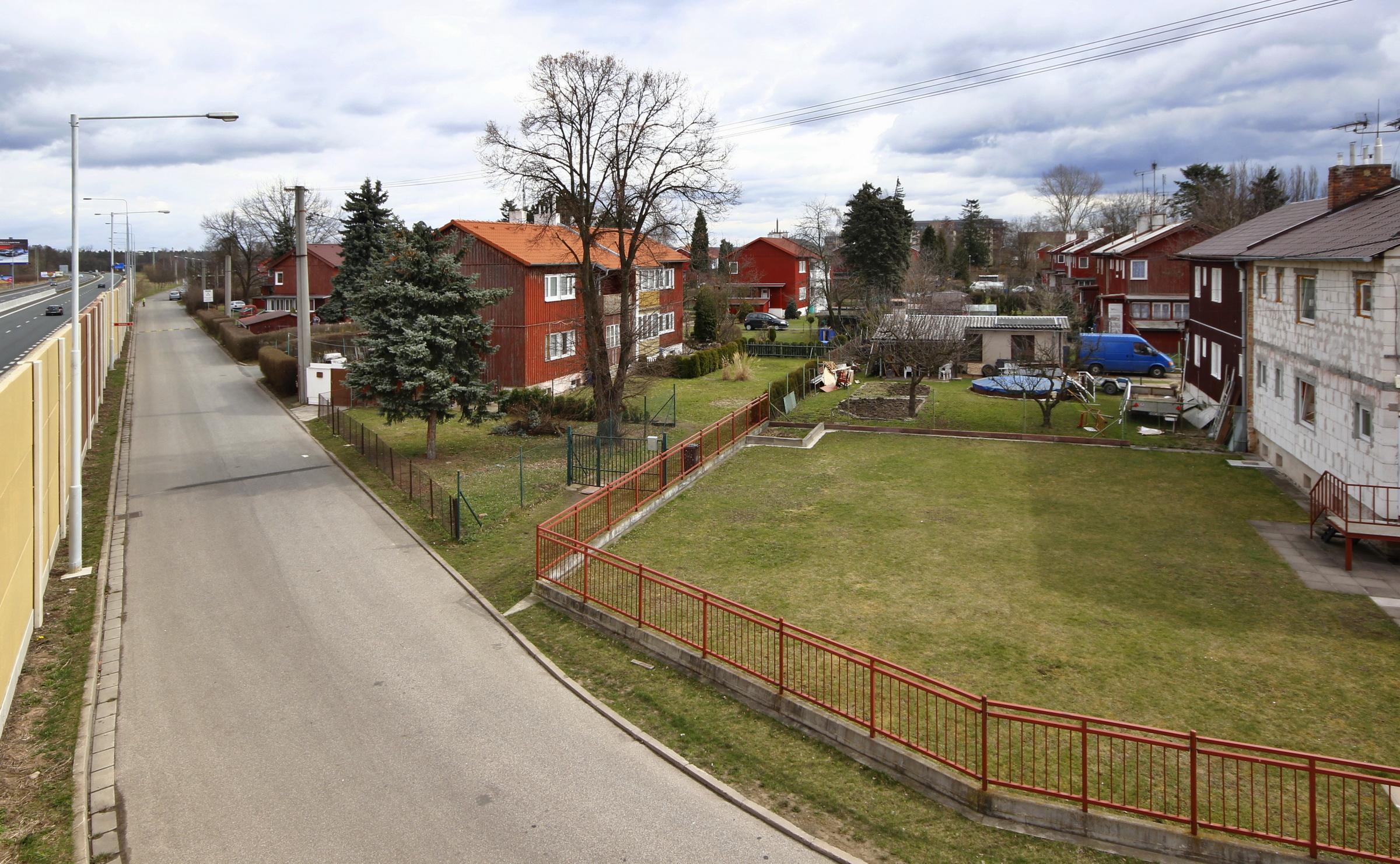 Pardubice, Ohrazenice, finské domky